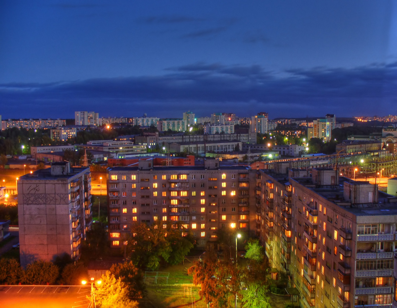 Ufa at night